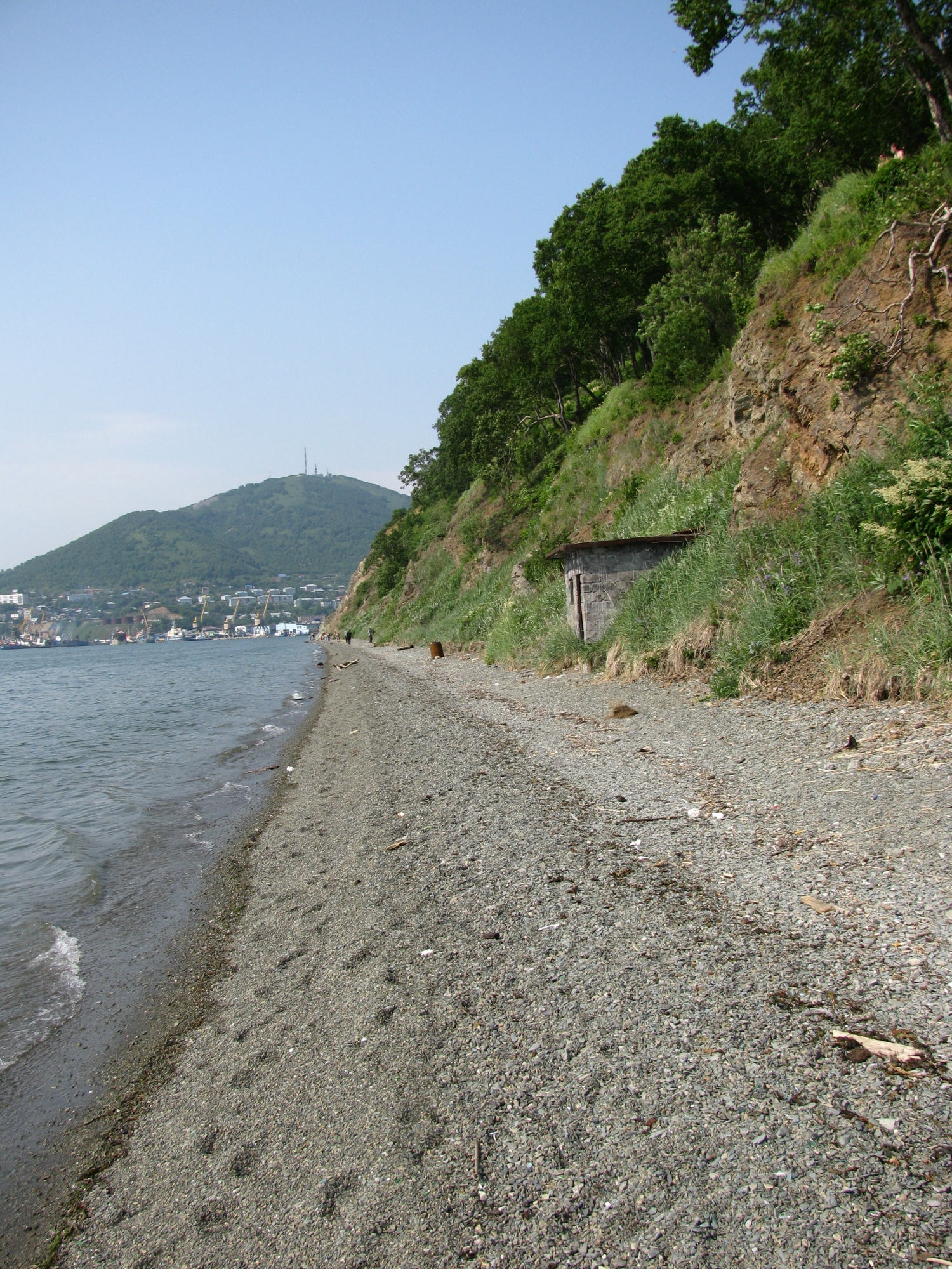 западные склоны Никольской сопки в Петропавловске-Камчатском. лето 2009